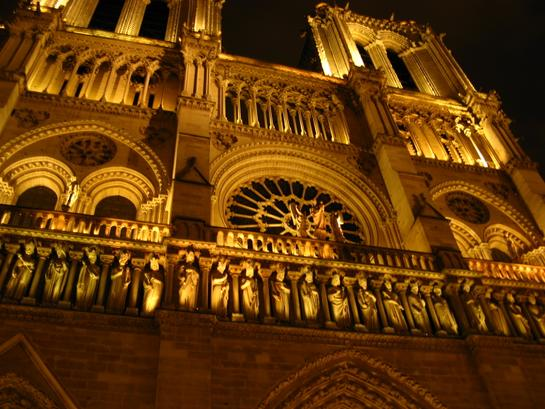 Notre Dame de Paris, (France).